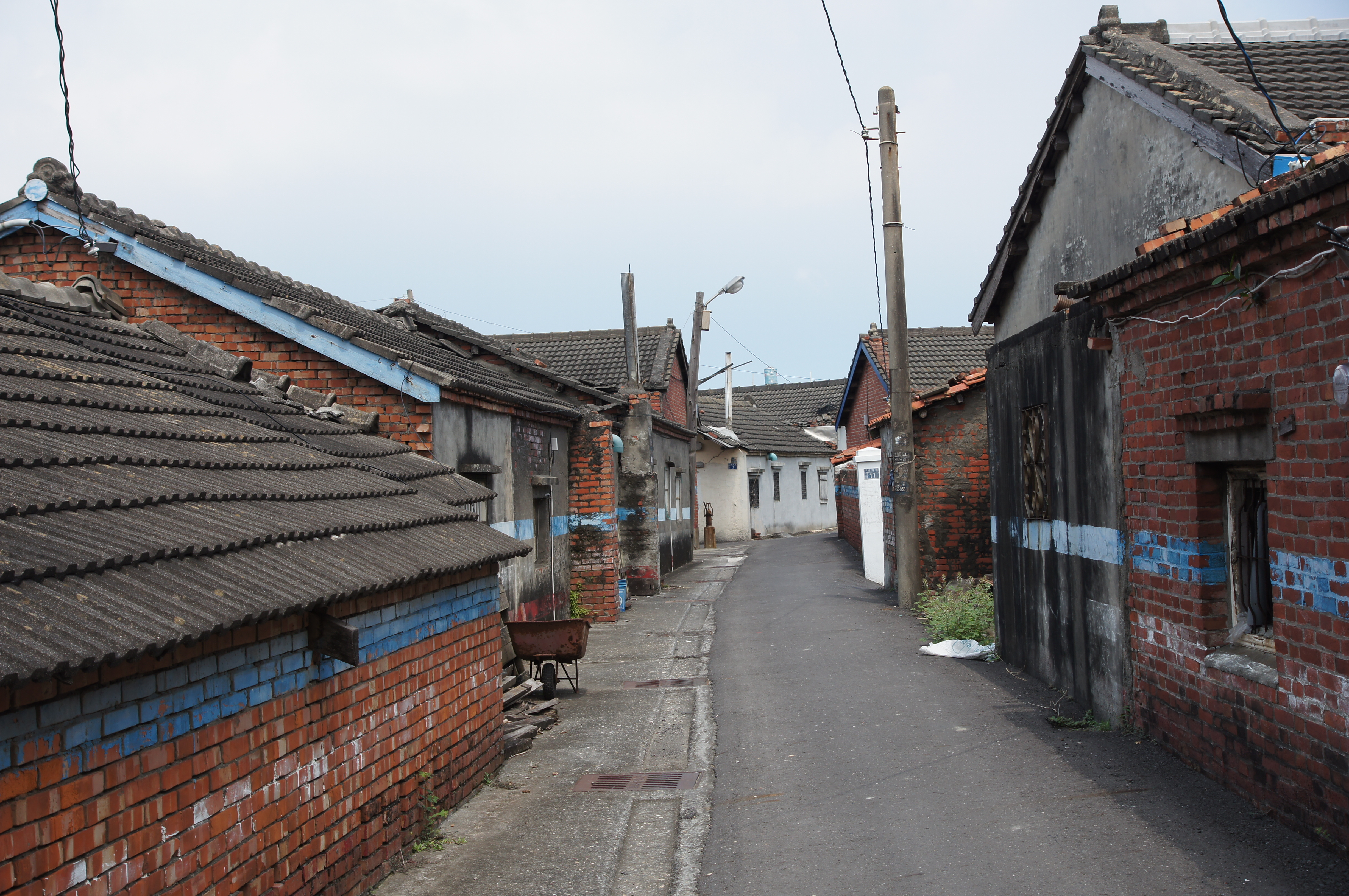 1970年後陸續蓋出的紅磚灰瓦傳統房舍